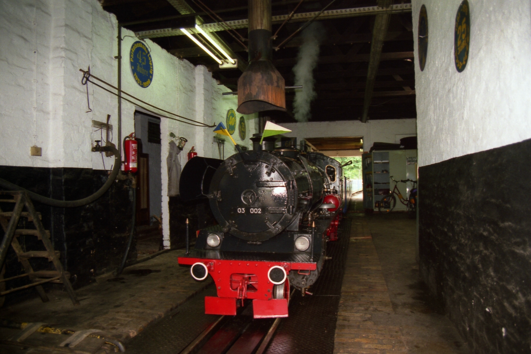 Martens’sche Einheitsliliputlok 03 002, ehemals 03 215 bei der Leipziger Parkeisenbahn 22.05.99